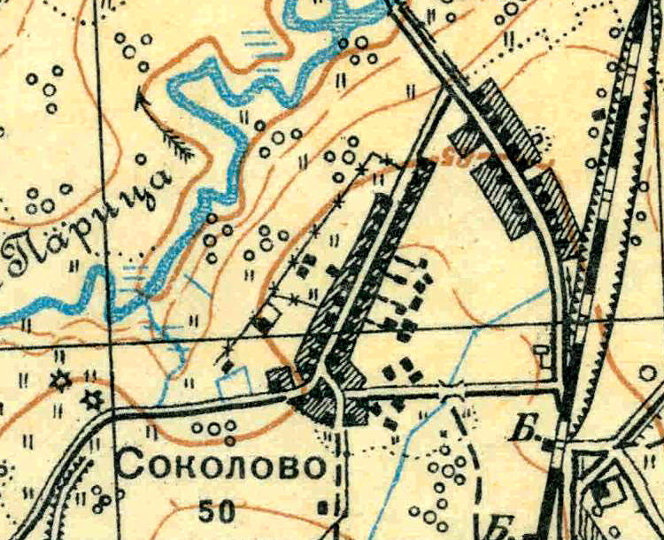 Топографическая карта Ленинградской области, квадрат О-36-13-А-а (Большая Пудость), деревня Сокколово